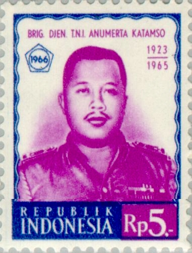 Katamso Darmokusumo